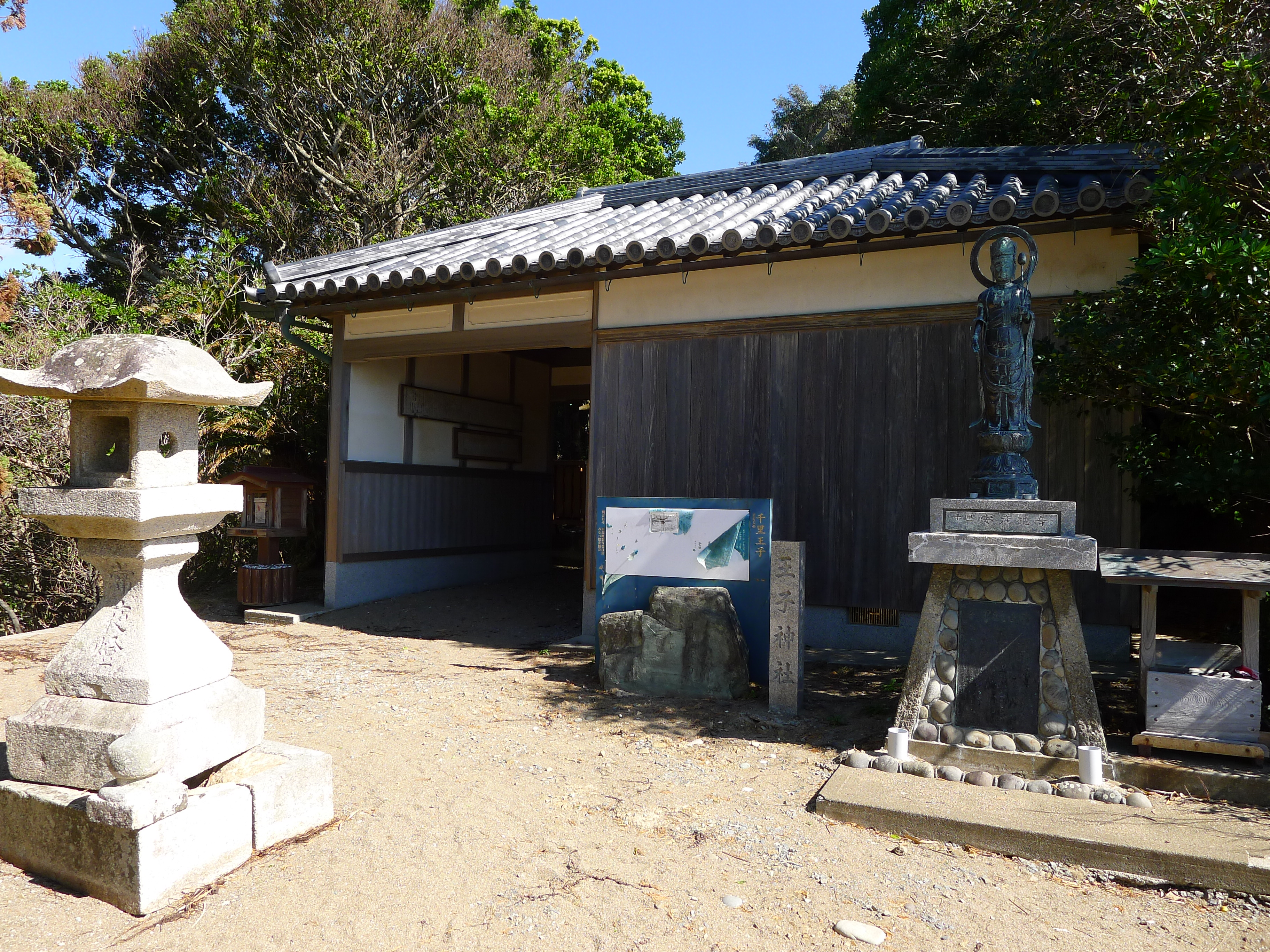 熊野古道・紀伊路の九十九王子の一つ千里王子（和歌山県みなべ町）